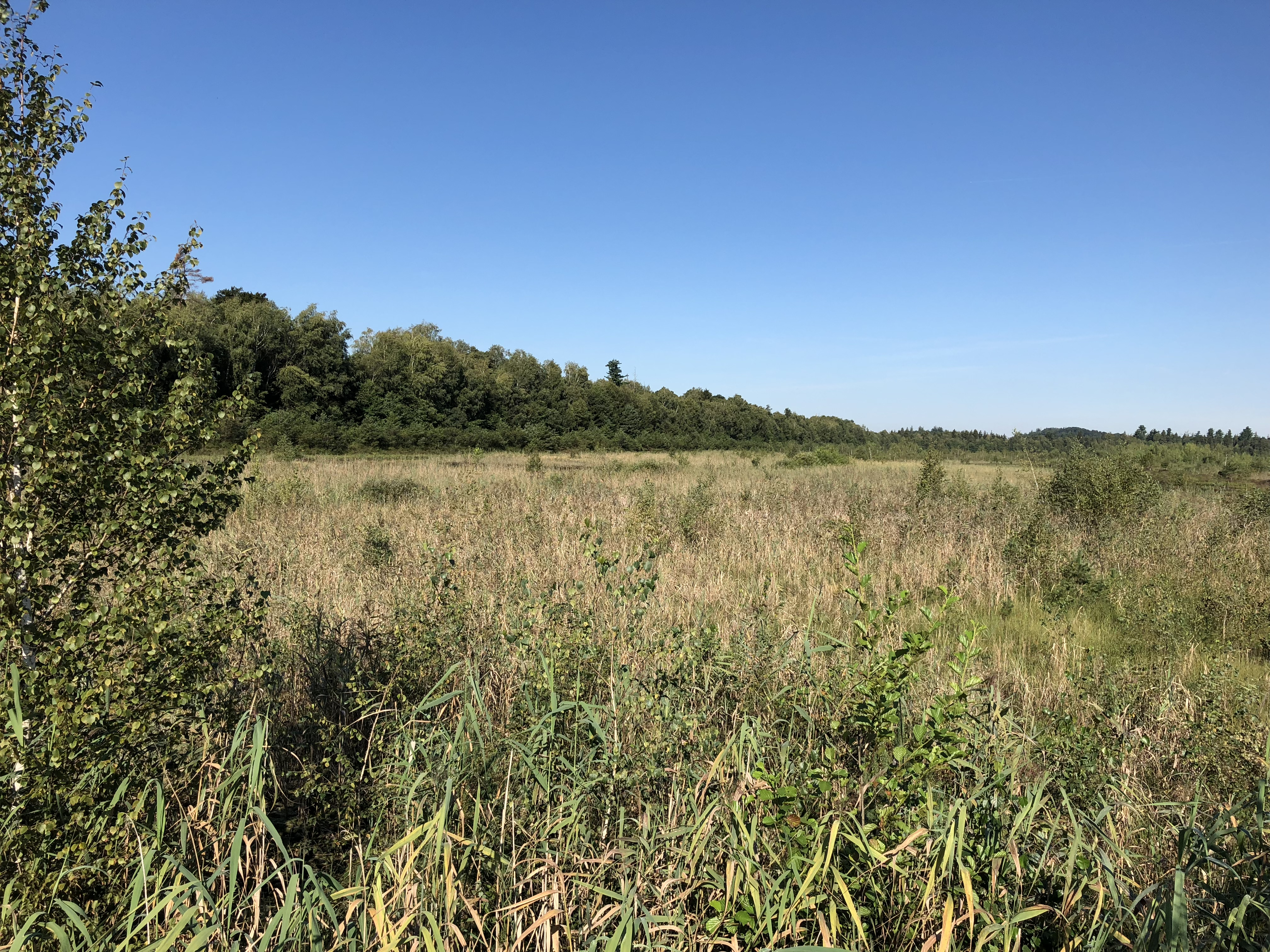 Südbereich